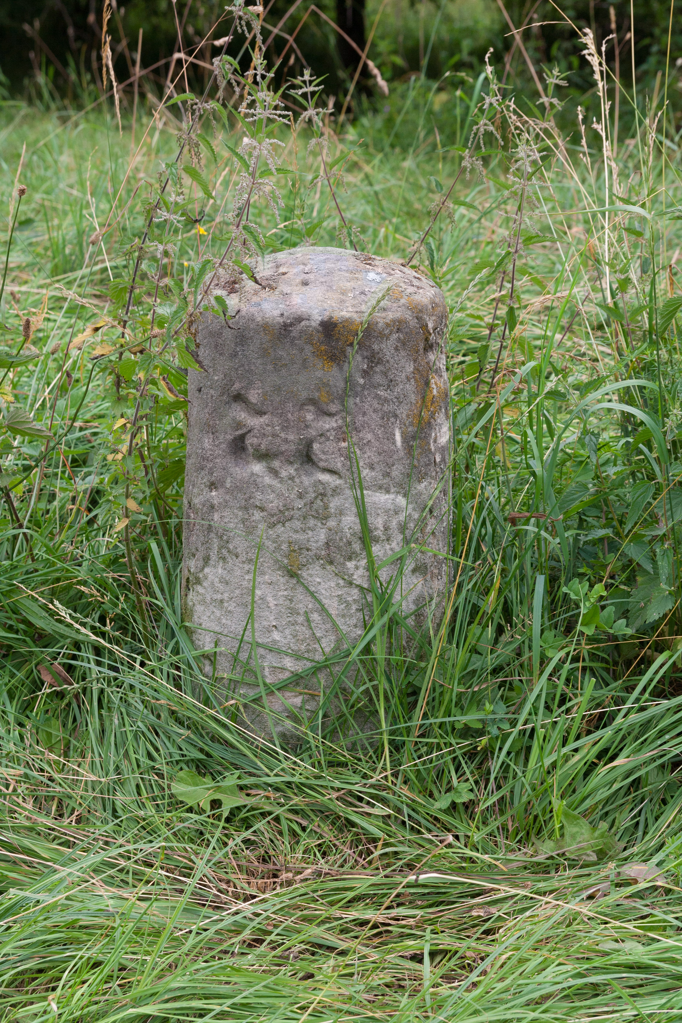 Ludwig-Donau-Main-Kanal, Kilometerstein, Oberölsbach